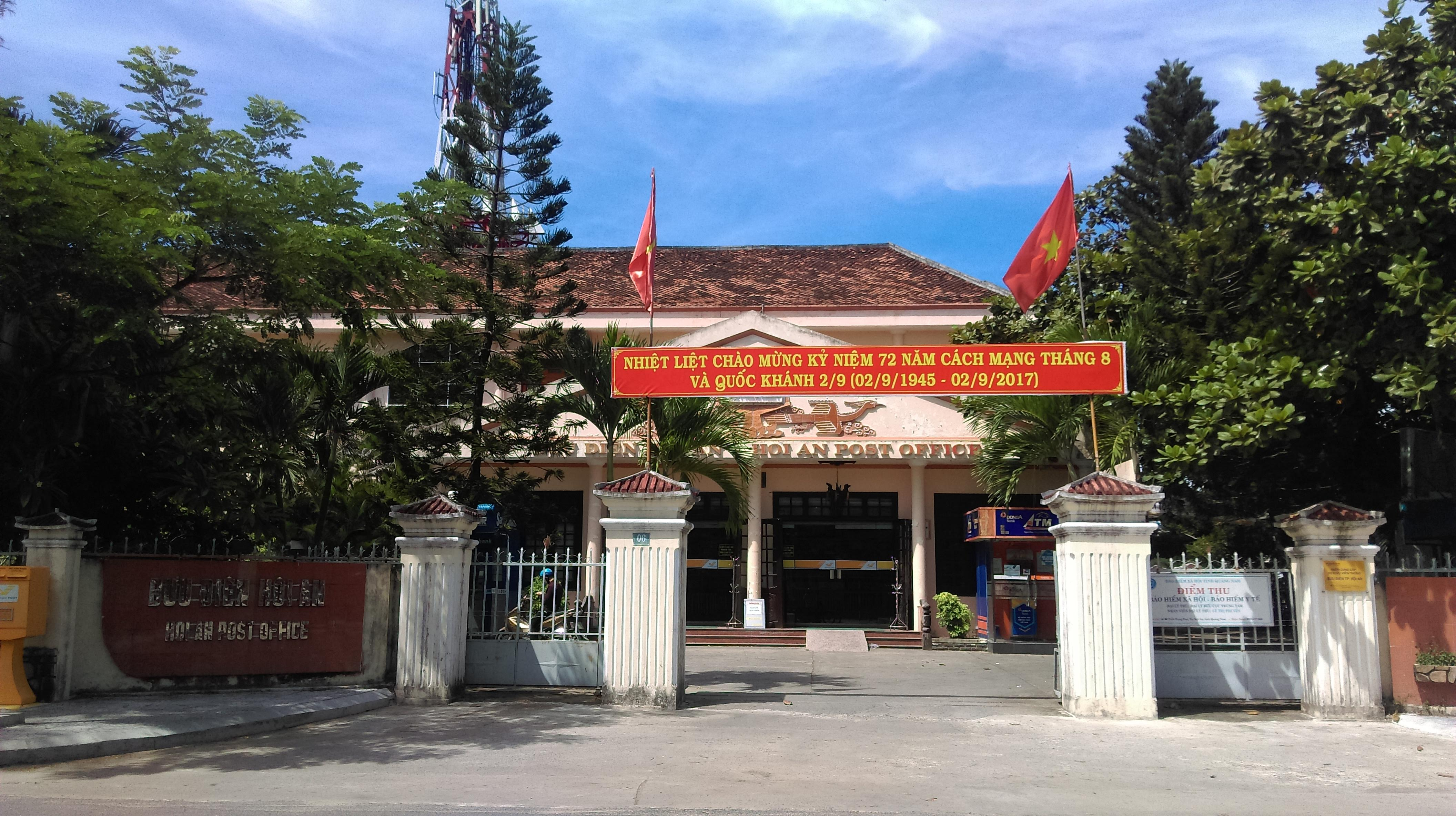 Bưu điện Hội An, Quảng Nam